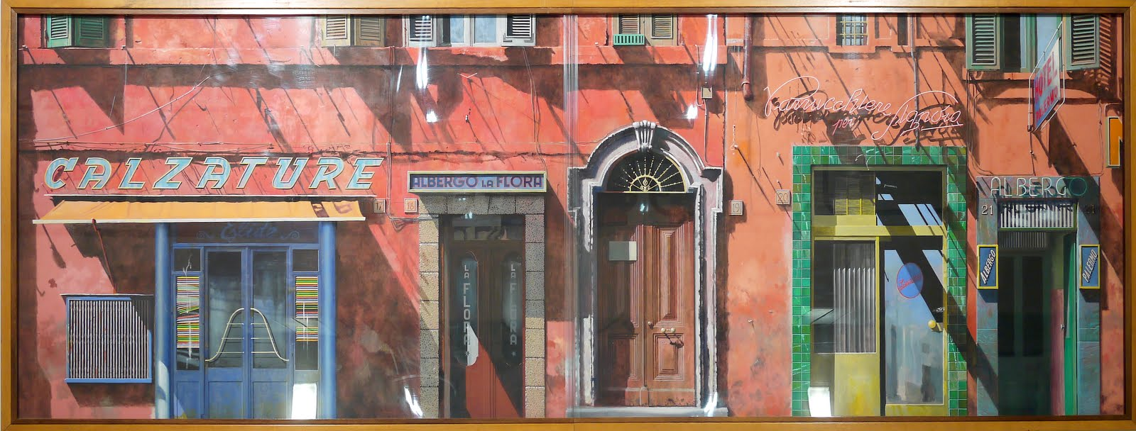 Alterlaa Kunst am Bau Franz Zadrazil